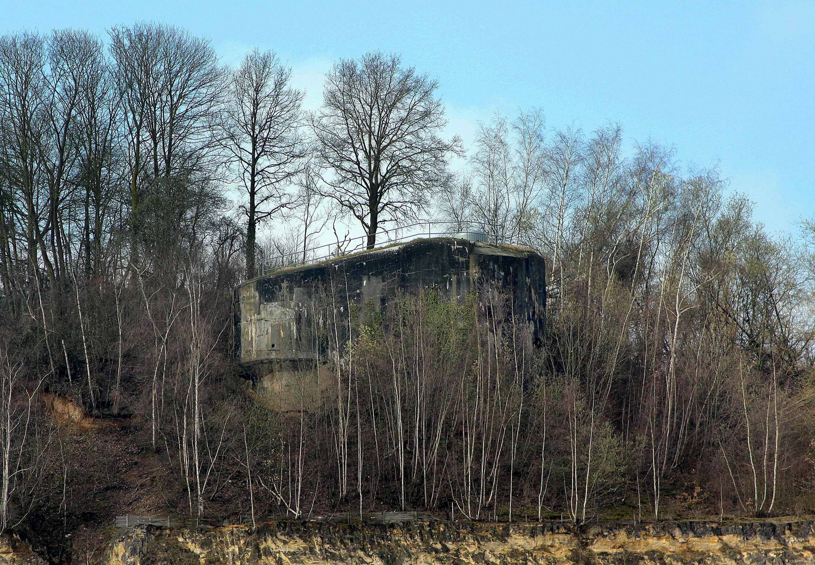 De Block Kanal Süd vum Fort Eben Emael